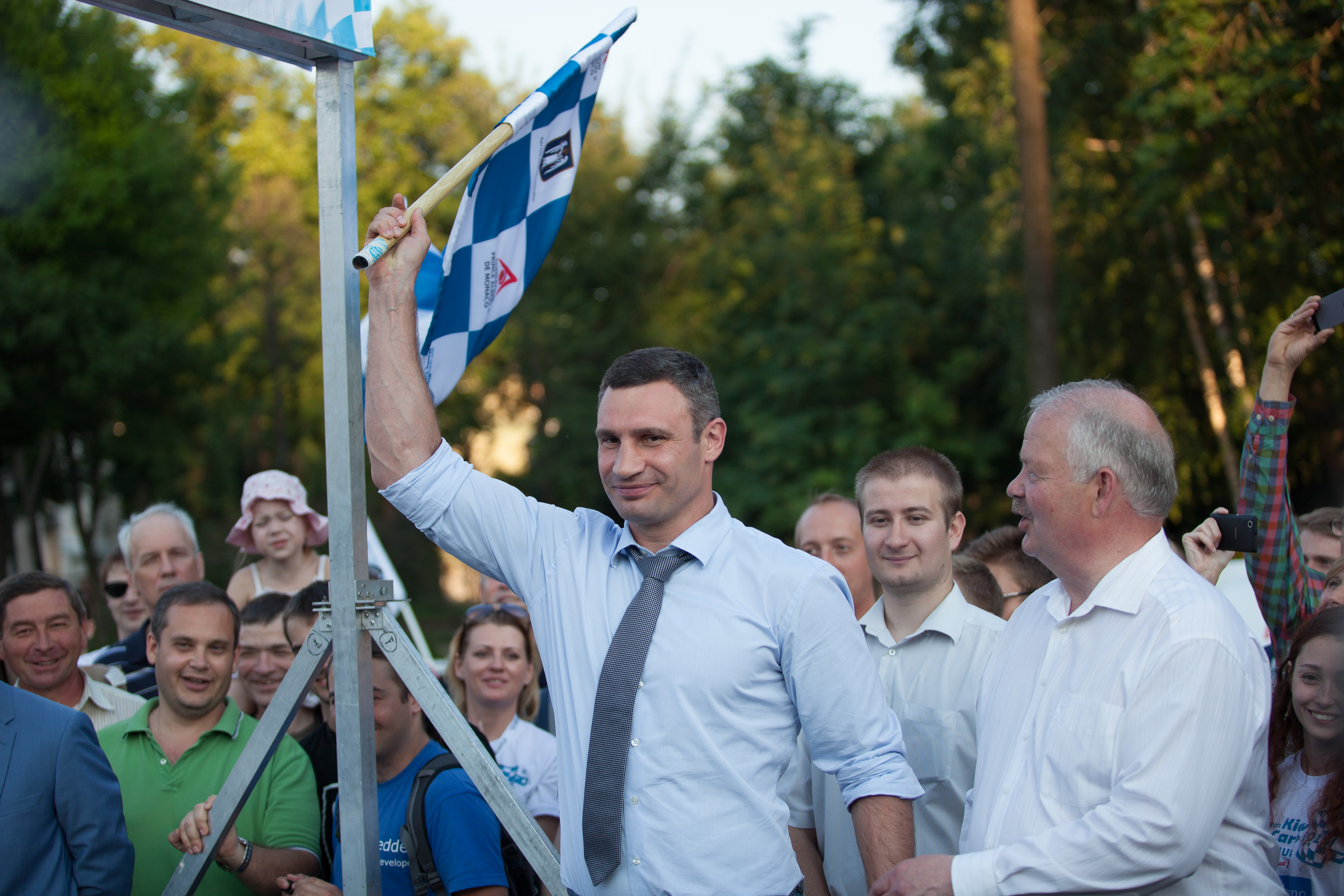 Мэр Киева Виатлий Кличко даёт символический старт "Электромобильному Марафону 2015"